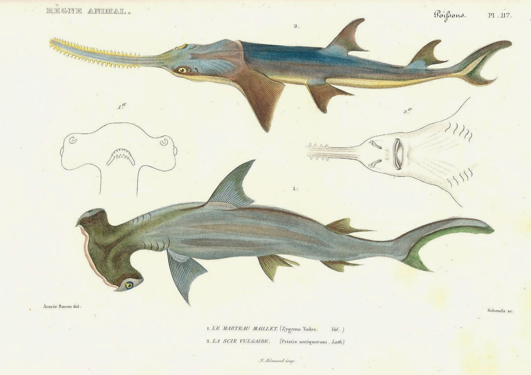 Planche N° 117 du livre "Le règne animal distribué d'après son organisation" par Georges Cuvier (Tome 8), seconde édition de 1828, représentant : -en haut : Pristis pristis syn. P. antiquorum -en bas : Sphyrna tudes syn. Zygoena tudes (Marteau maillet)